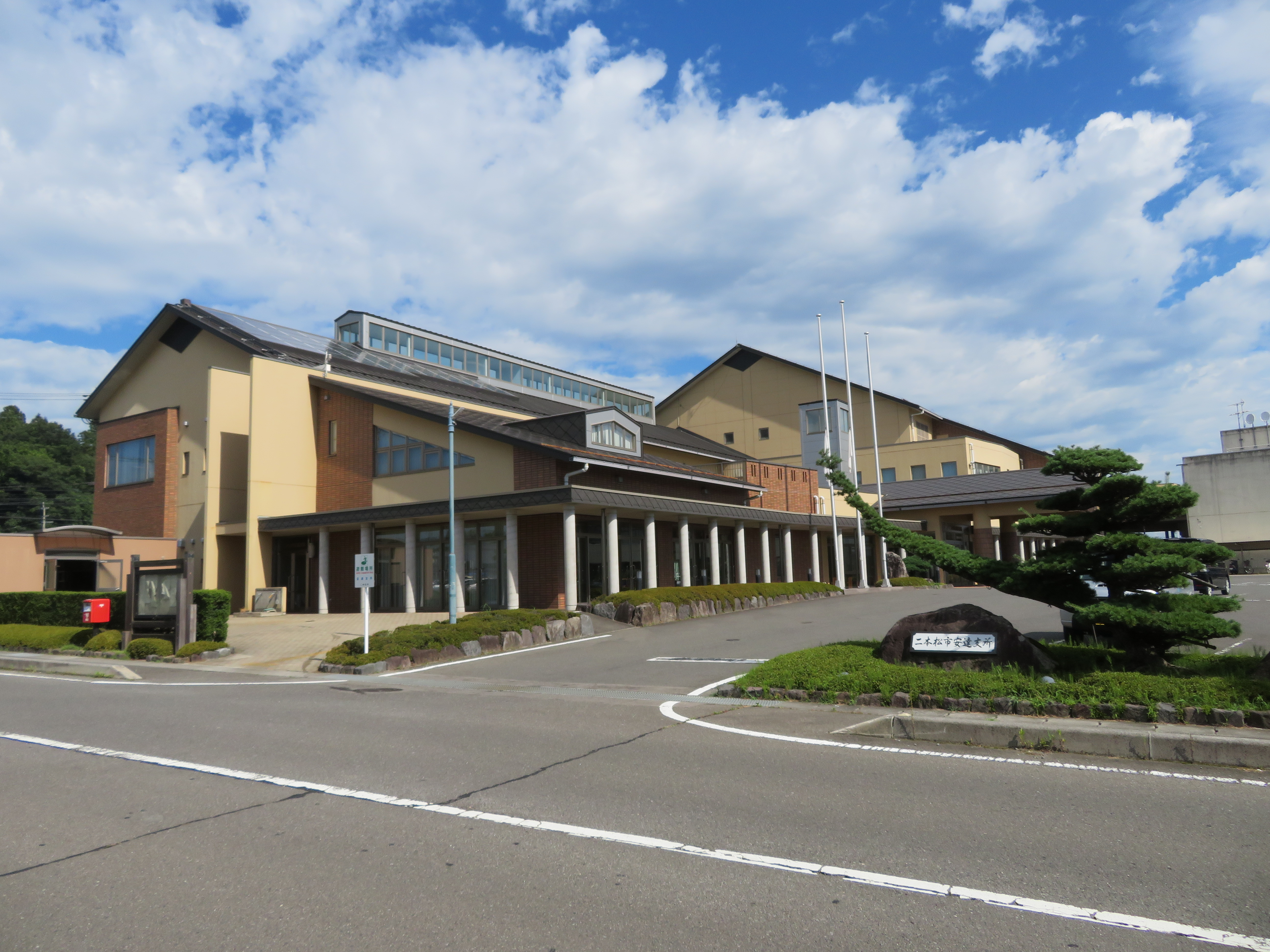 二本松市役所安達支所庁舎（旧安達町役場庁舎）